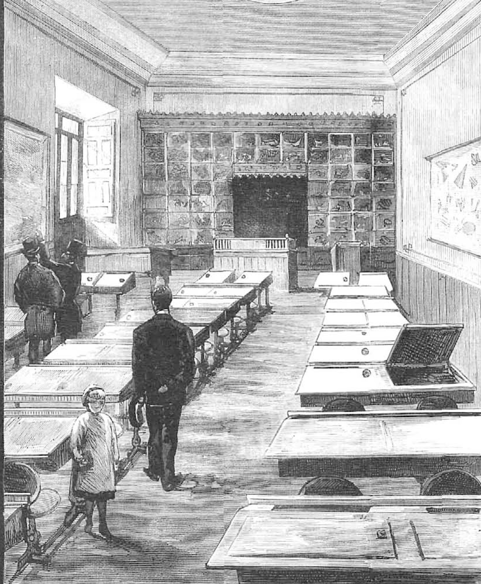 Madrid, Escuela-Modelo, inaugurada el 21 de septiembre de 1885.